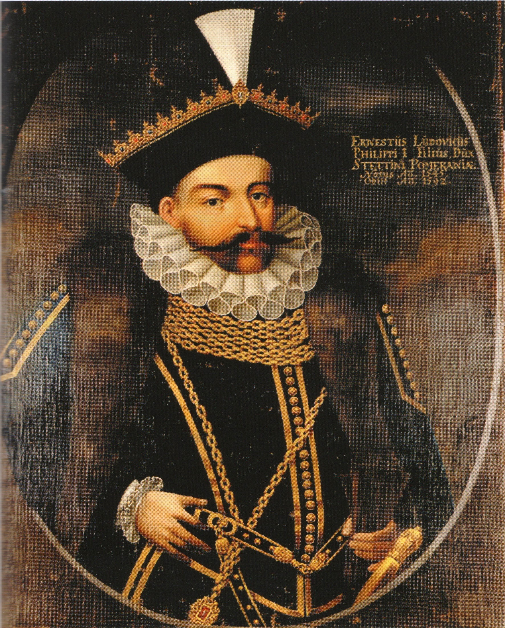 Ölgemälde von Herzog Ernst Ludwig von Pommern, Kopie nach einer Vorlage im Alten Rathaus in Anklam